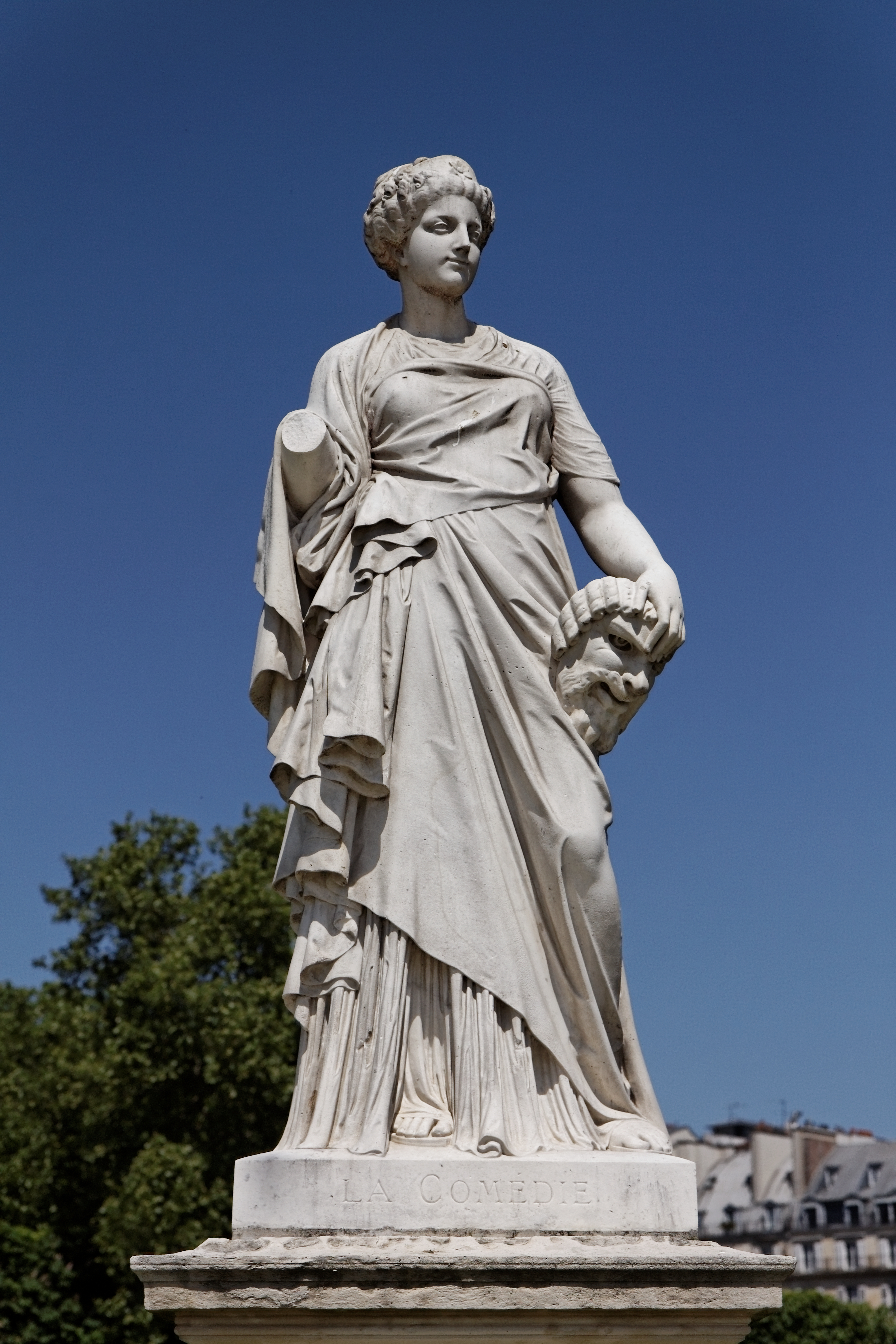 Une statue dans le jardin des Tuileries à Paris. Julien Toussaint Roux - La Comédie.